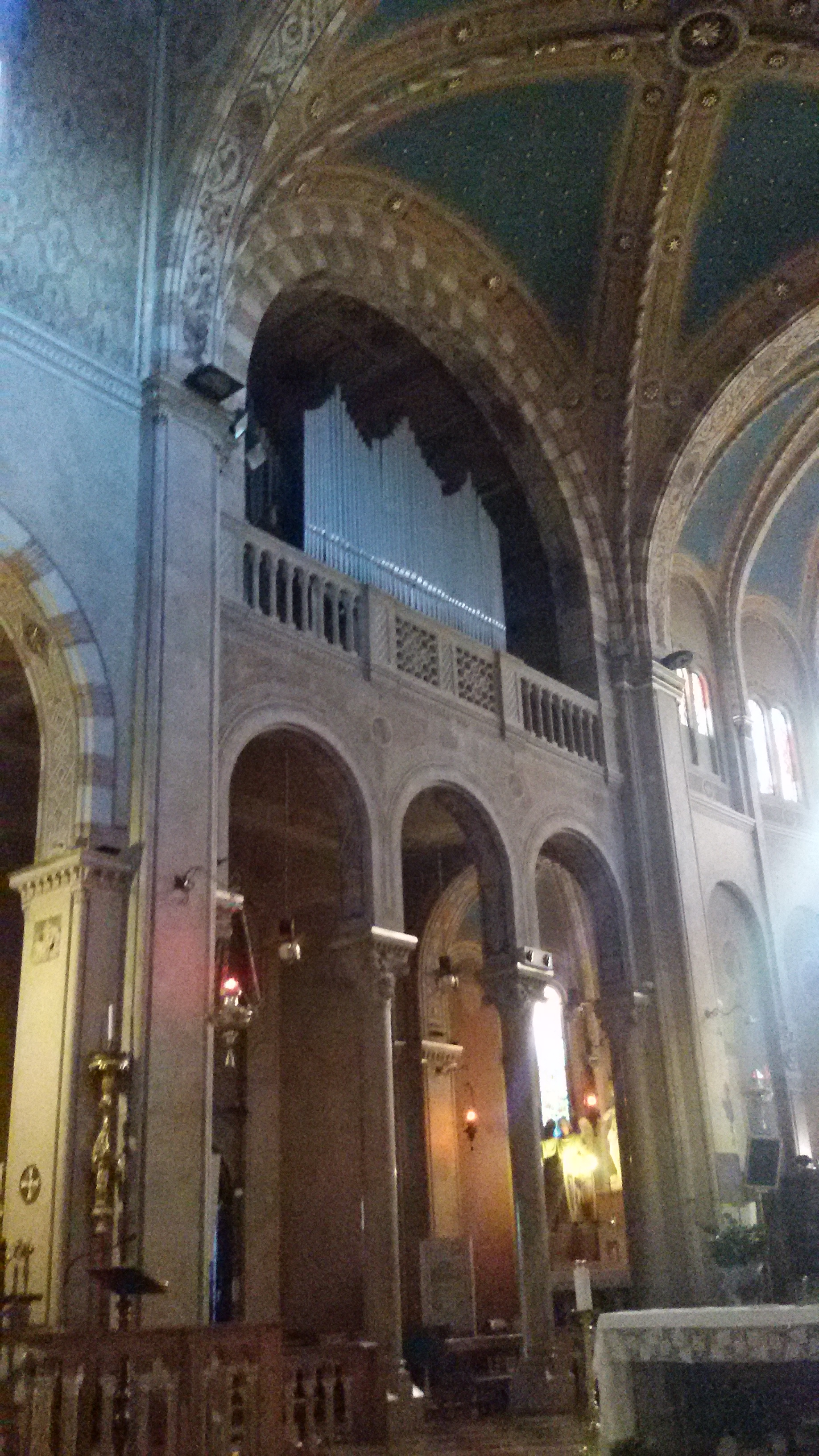 Chiesa di Santa Cristina Quinto di Treviso